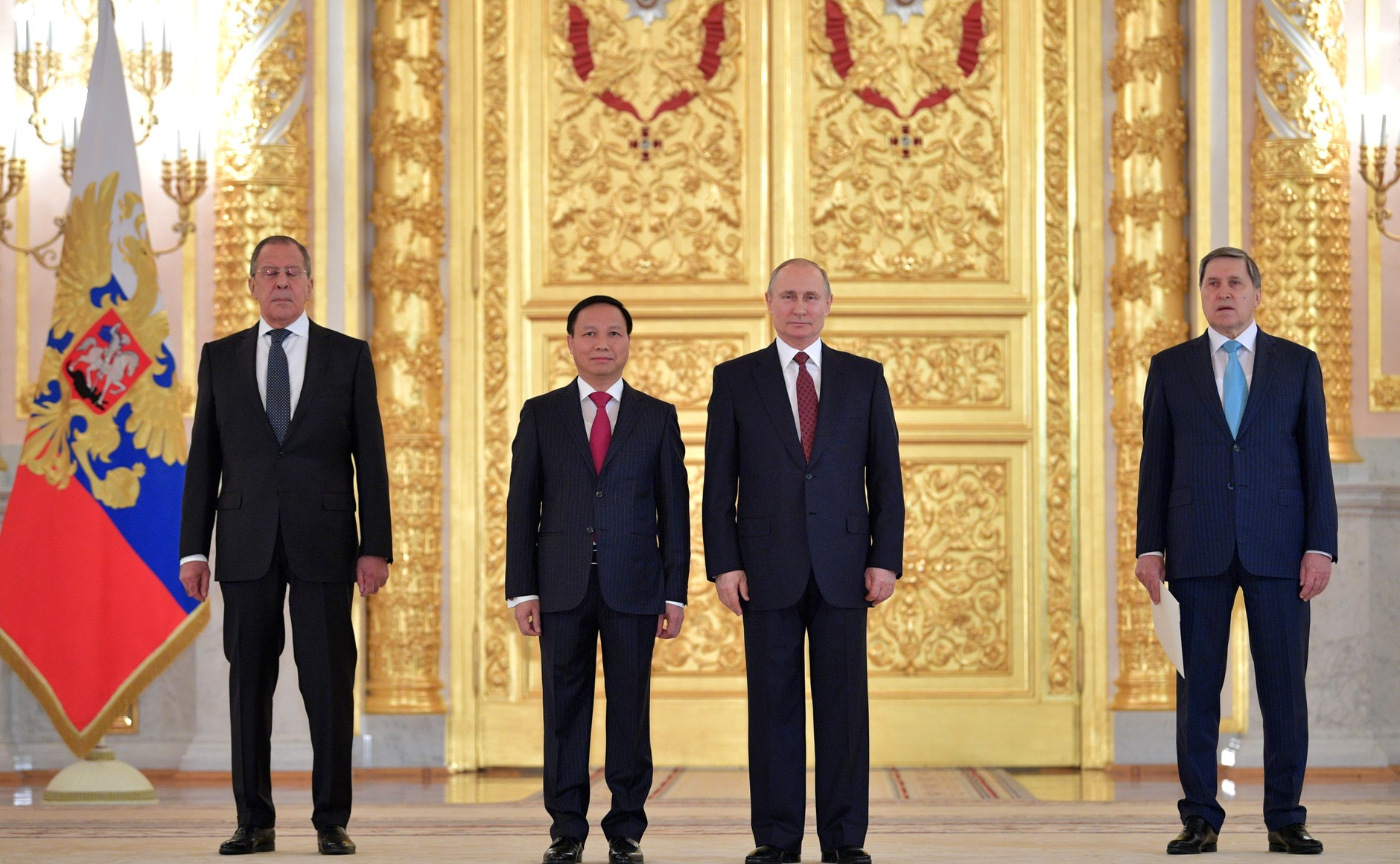 В Александровском зале Большого Кремлёвского дворца Владимир Путин принял верительные грамоты у послов ряда иностранных государств. На церемонии вручения верительных грамот. С Чрезвычайным и Полномочным Послом Социалистической Республики Вьетнам в Российской Федерации Нго Дык Манем.